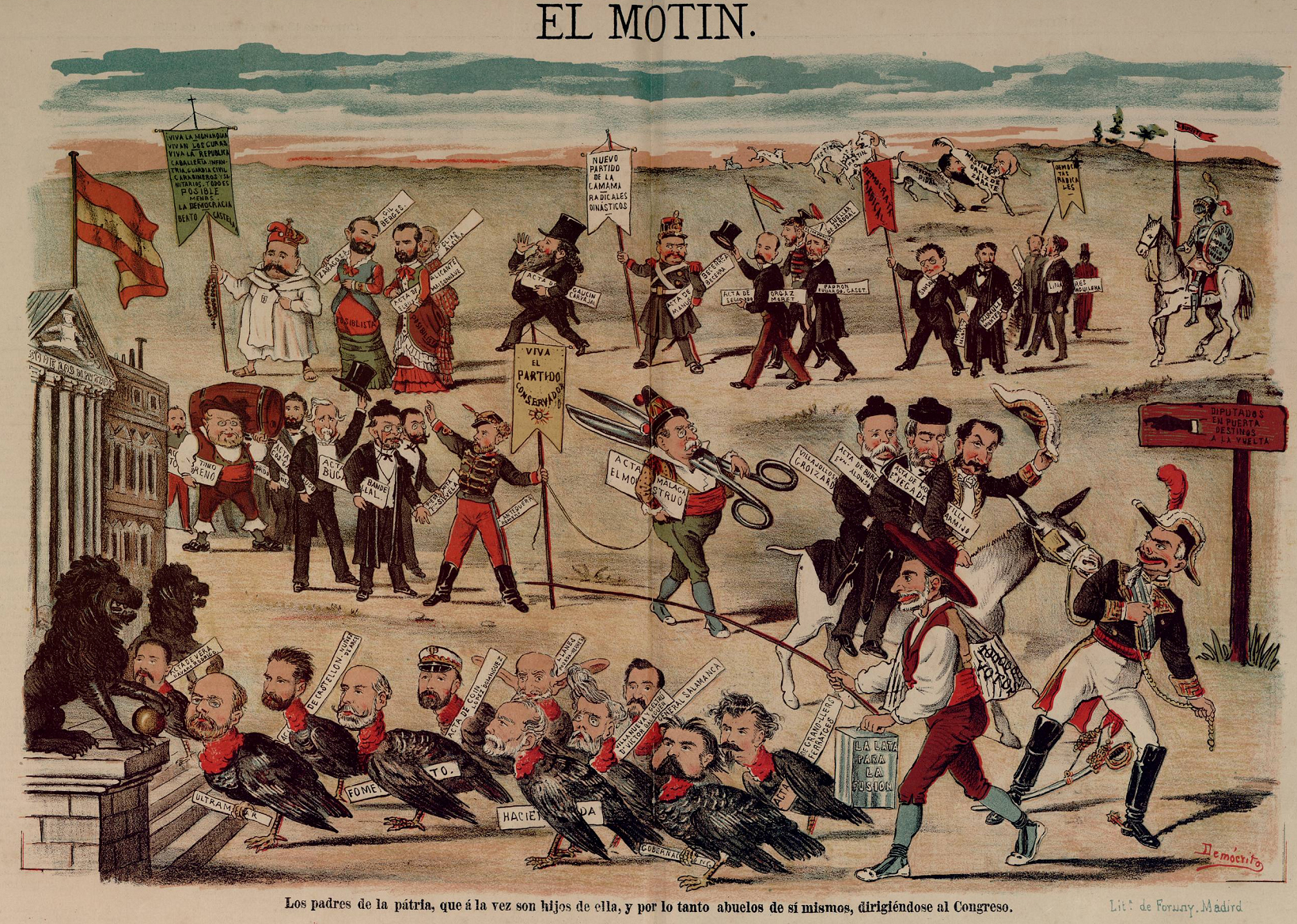 Los padres de la patria, que a la vez son hijos de ella, y por lo tanto abuelos de sí mismos, dirigiéndose al Congreso, illustración por Eduardo Sojo Demócrito, publicada en la revista satírica española El Motín.